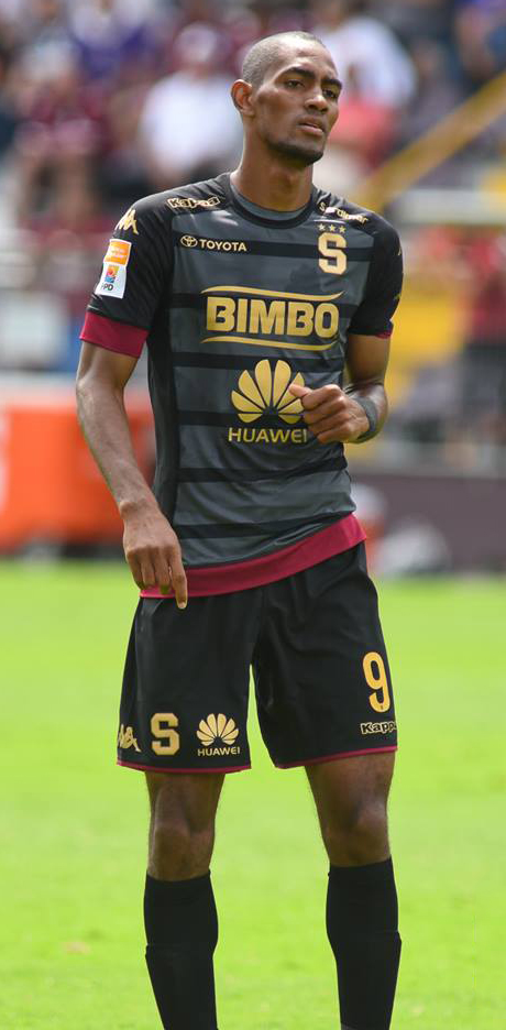 22-10-2017. Jerry Bengtson jugando para el Deportivo Saprissa, con el nuevo tercer uniforme de la temporada.